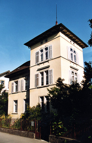 Geburtshaus (Haus zum Nussbaum) von Fritz Wartenweiler Junior (?) in Frauenfeld